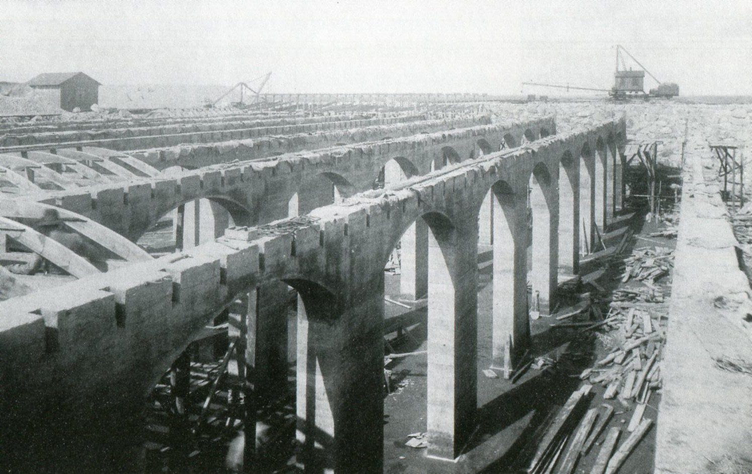 Konstruktion och byggarbeten för Trekantsreservoaren i Stockholm